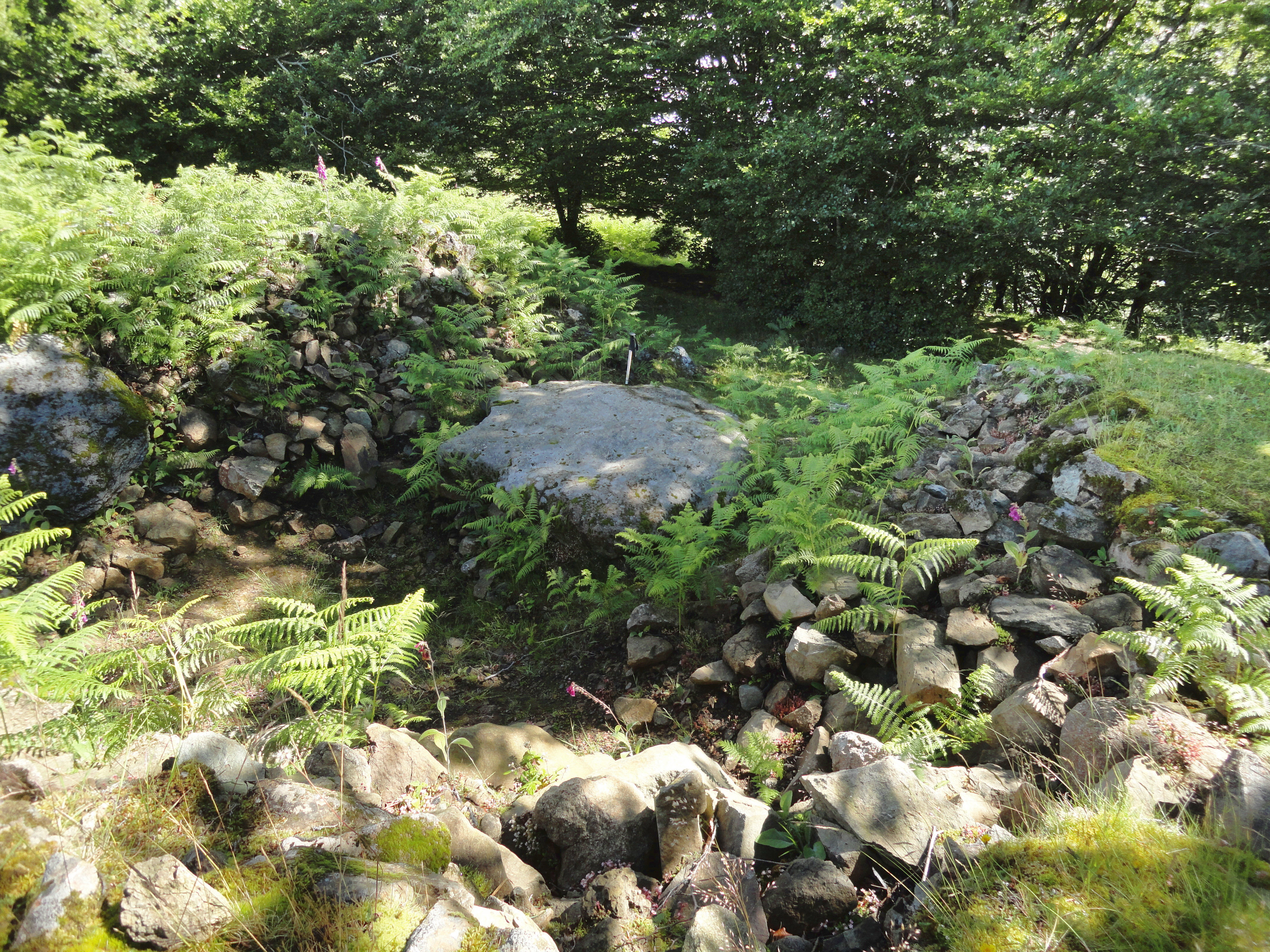 Keixetako Egia Hego trikuharria